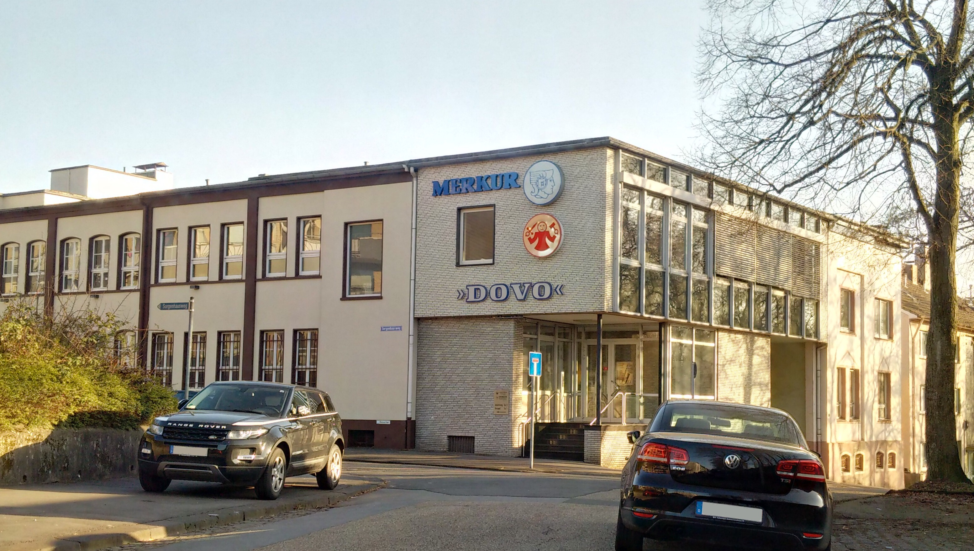 Firmensitz von DOVO Solingen am Sorgenhausweg in Wald, aufgenommen im Winter 2016/2017